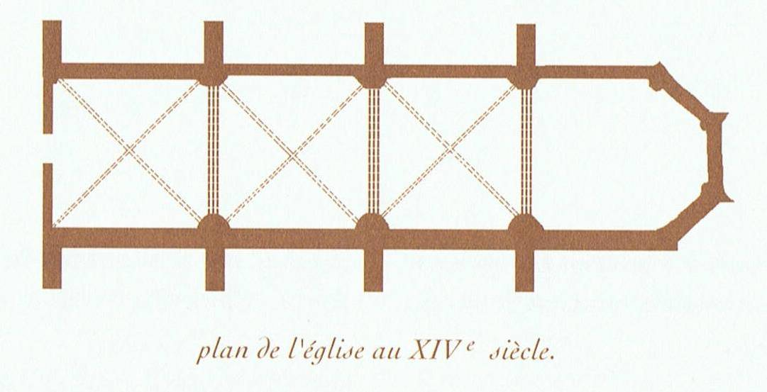 Plan église de Pertuis au 14è siècle